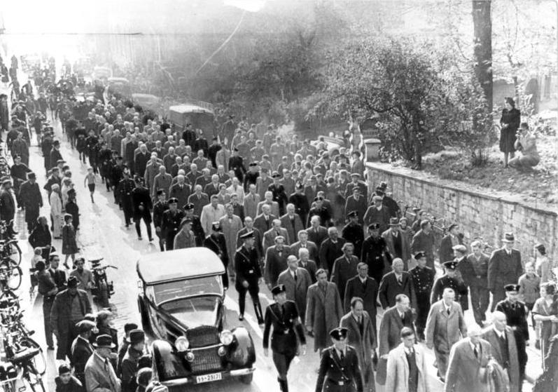 ADN-ZB/Repro/Archiv/18.5.1989 Faschistisches Deutschland 1933-1945/Verhaftung jüdischer Männer in Baden-Baden im November 1938: Nach dem faschistischen antisemitischen Pogrom vom 9./10. November 1938 wurden etwa 30 000 Juden verhaftet und in Konzentrationslager verschleppt.